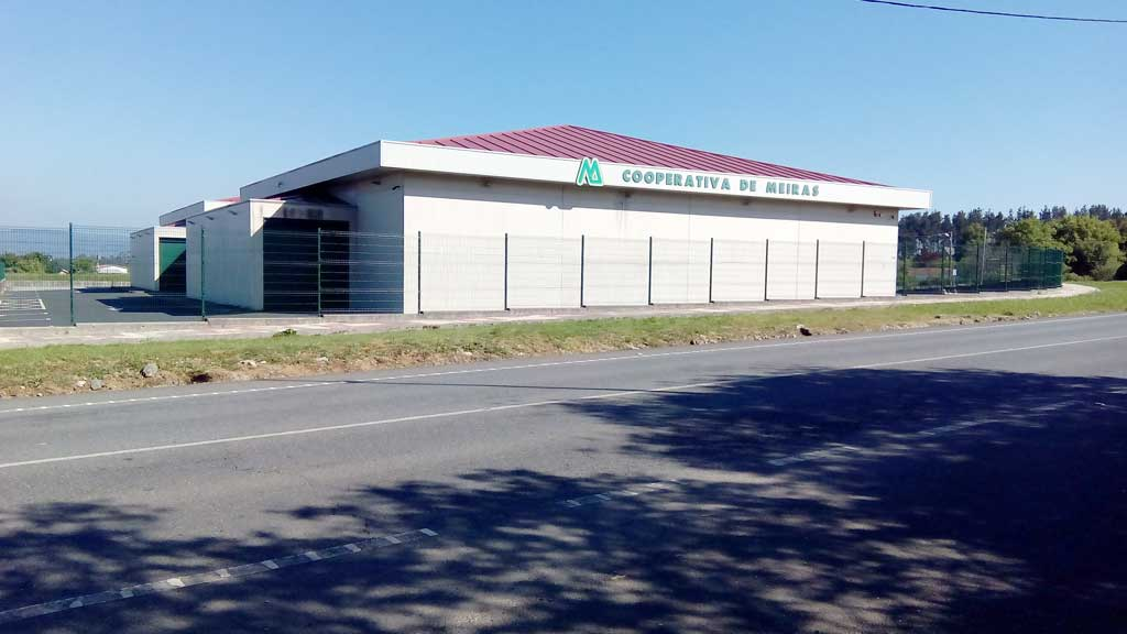 Cooperativa de Meirás en A Pena, Trasancos.